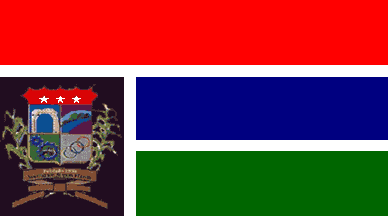 Bandera del municipio Simón Planas, estado Lara, Venezuela